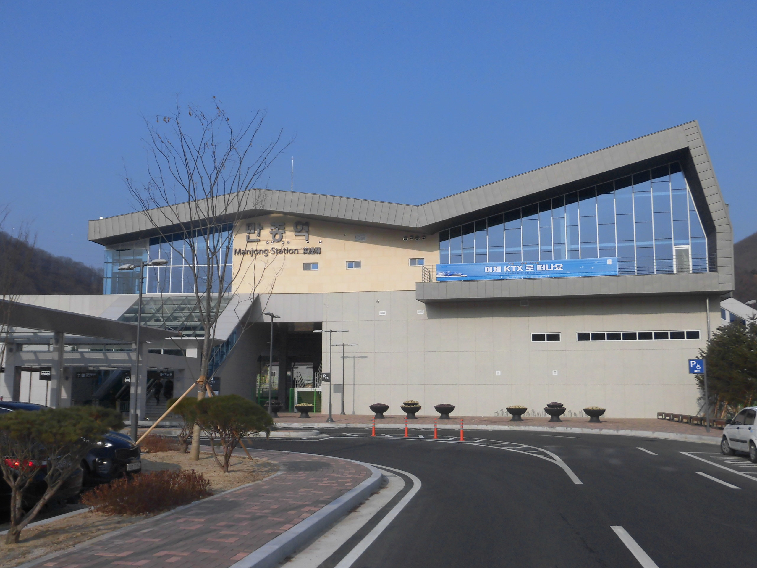 강원도 원주시에 있는 만종역